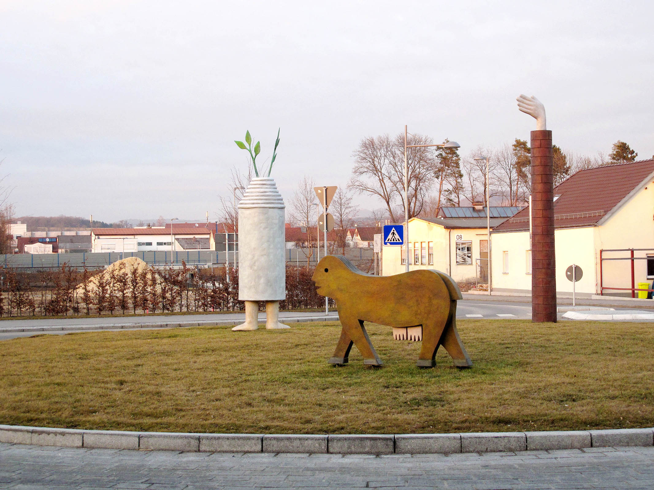 Fritz Schwegler, drei Teile des Werkszyklus „Unbewegliches Theater“, 2011, - Deutschland, Baden-Württemberg, Eislingen/Fils, Verkehrskreisel Ulmerstraße/Osttangente